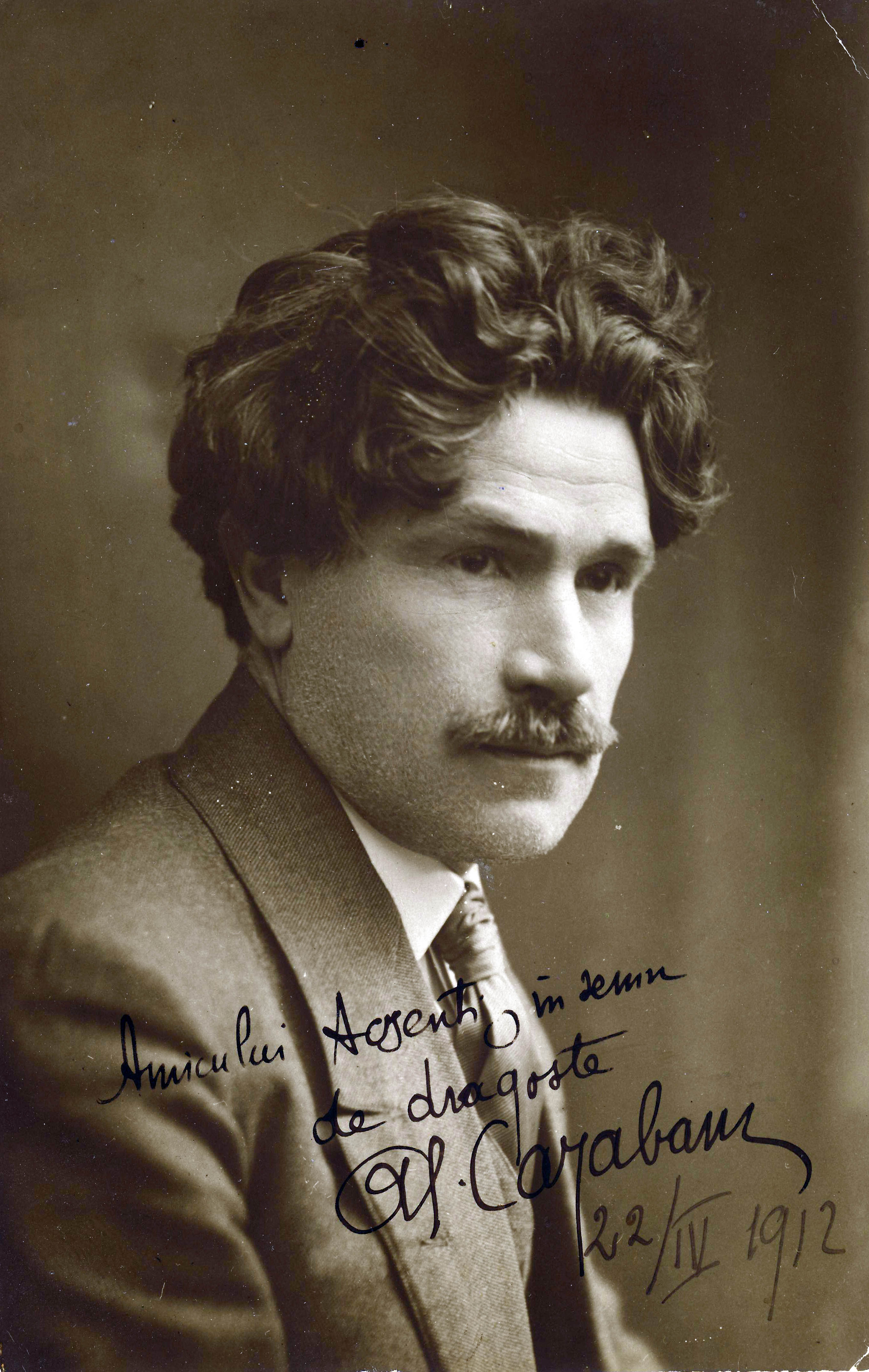 Categorie:Scriitori români din secolul al XX-lea